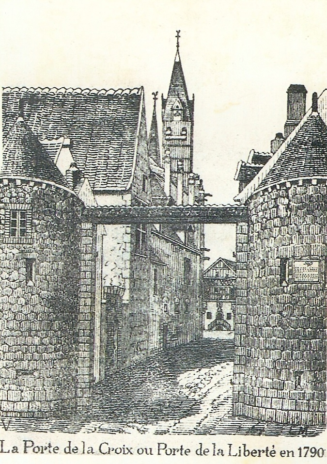 Carte postale de la porte de la croix ou porte de la liberté à Saint-julien-du sault en 1790 Le libraire Poulais-Rocher qui a imprimé la carte a cessé ses activités en 1910